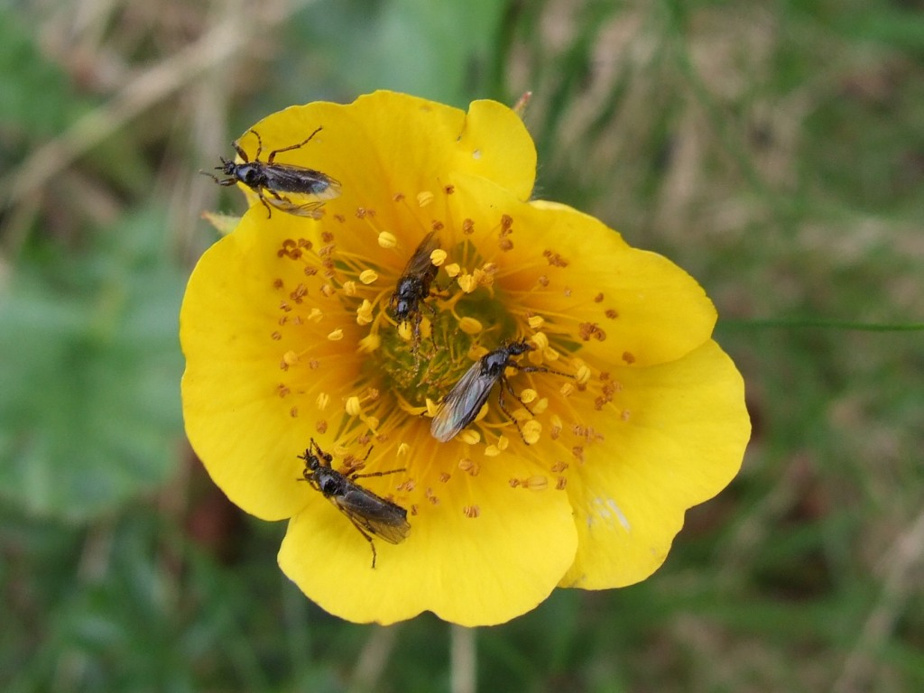 Ranunculus oreophilus - flover